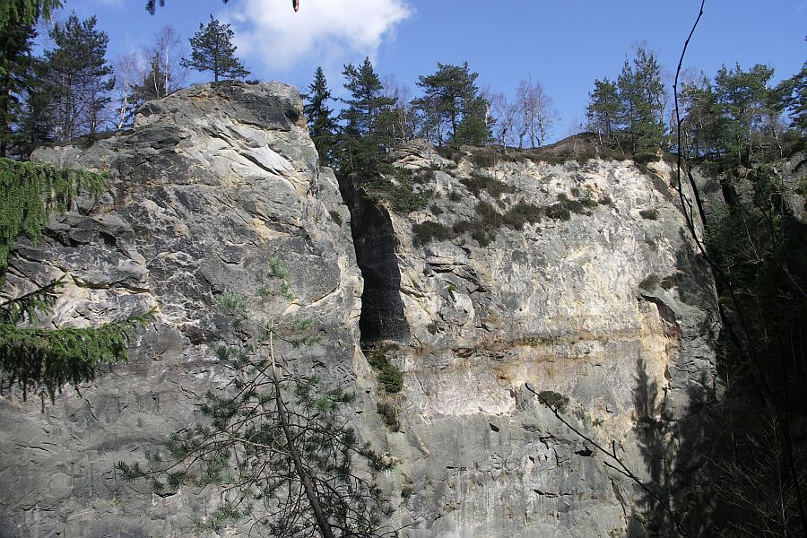 Muehlsteinbrueche, Saxony, Germany